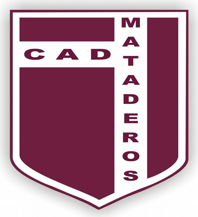 Escudo Club Mataderos